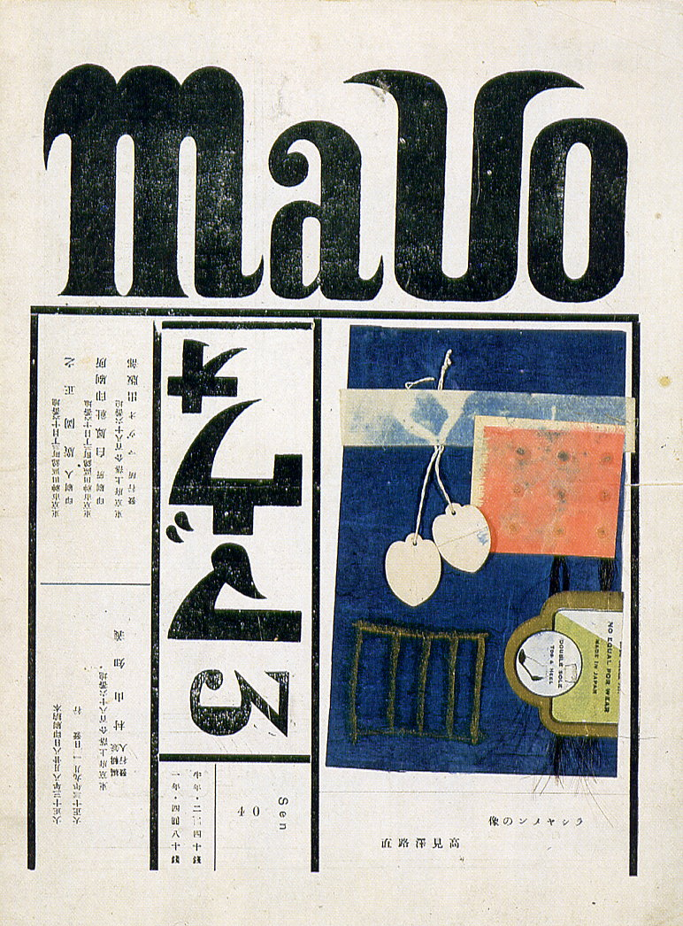 Cover MAVO nº 3, sep-1924. Machiya City Museum of Graphic Art